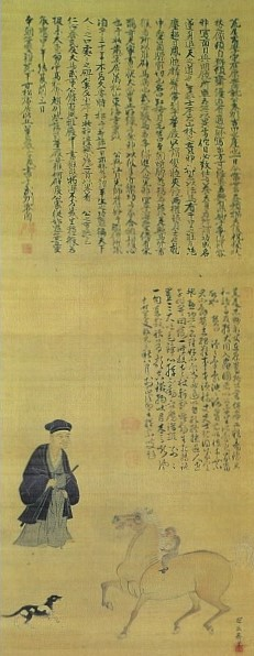 因幡鳥取藩家老・荒尾嵩就の肖像画。